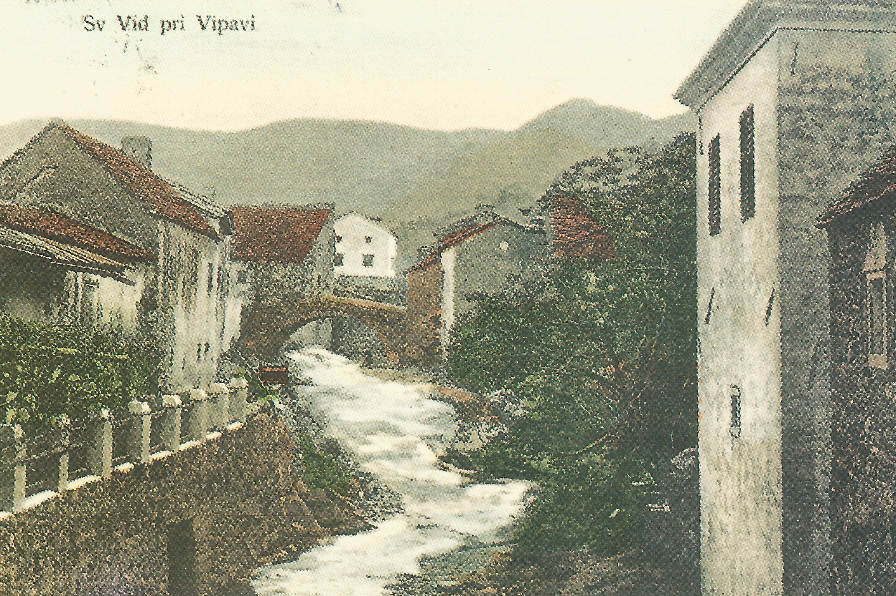 Razglednica Podnanosa.